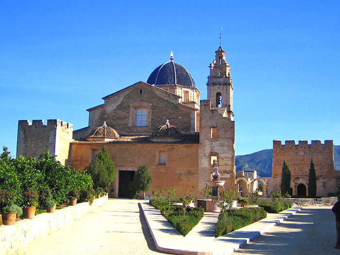 Santa Maria de la Valldigna, Simat de la Valldigna, Safor, País Valencià.